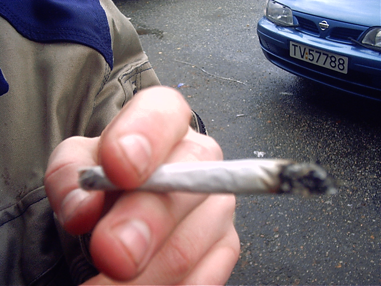 Bilde av en rullings.